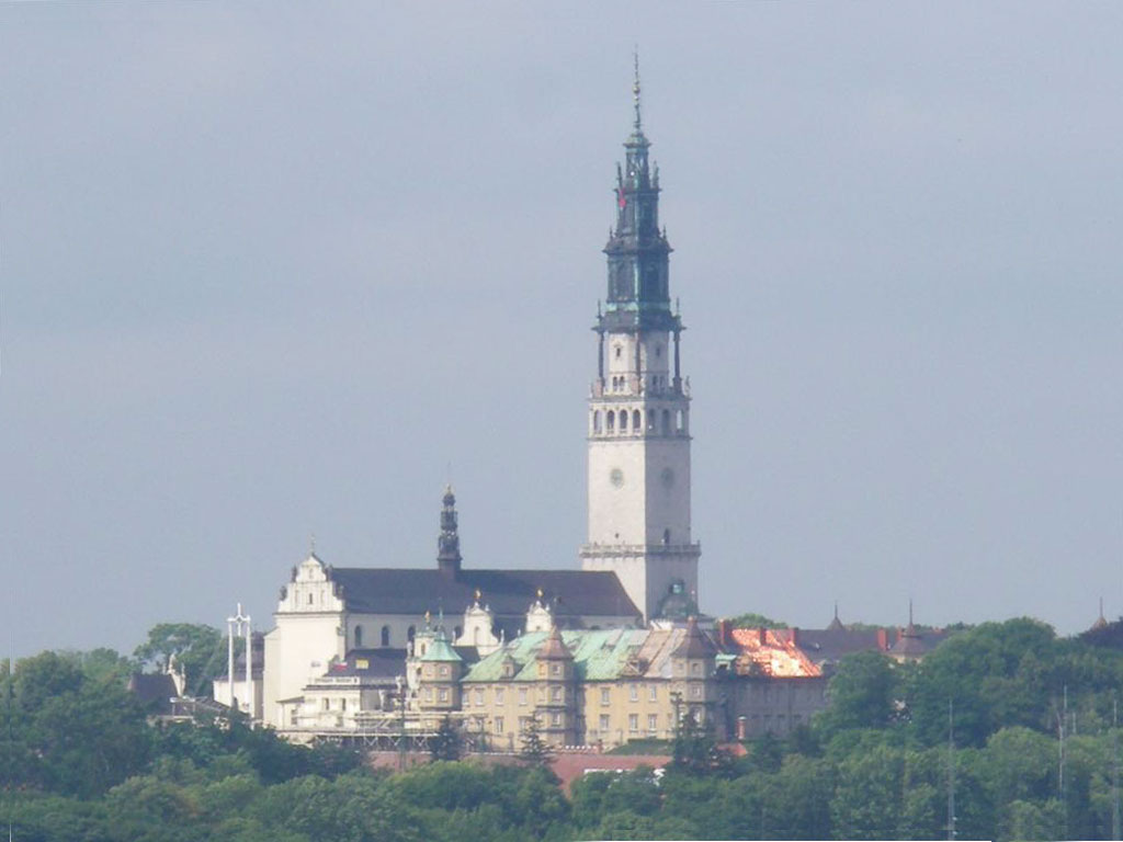 Jasna Góra - widok do północnego-wschodu